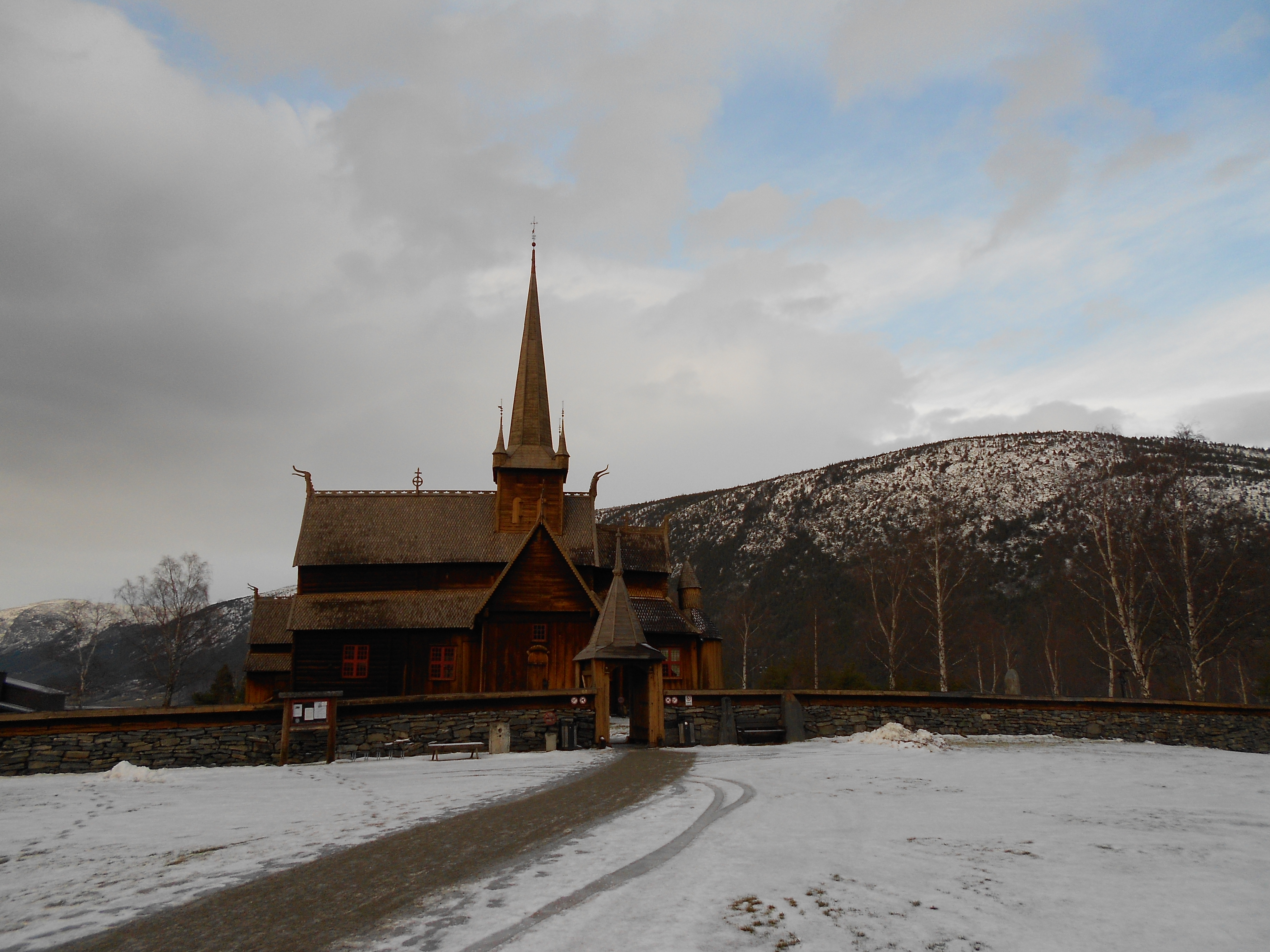 Iglesia de Lom, condado de Oppland.